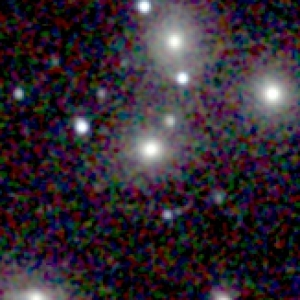 Galaxy NGC 71